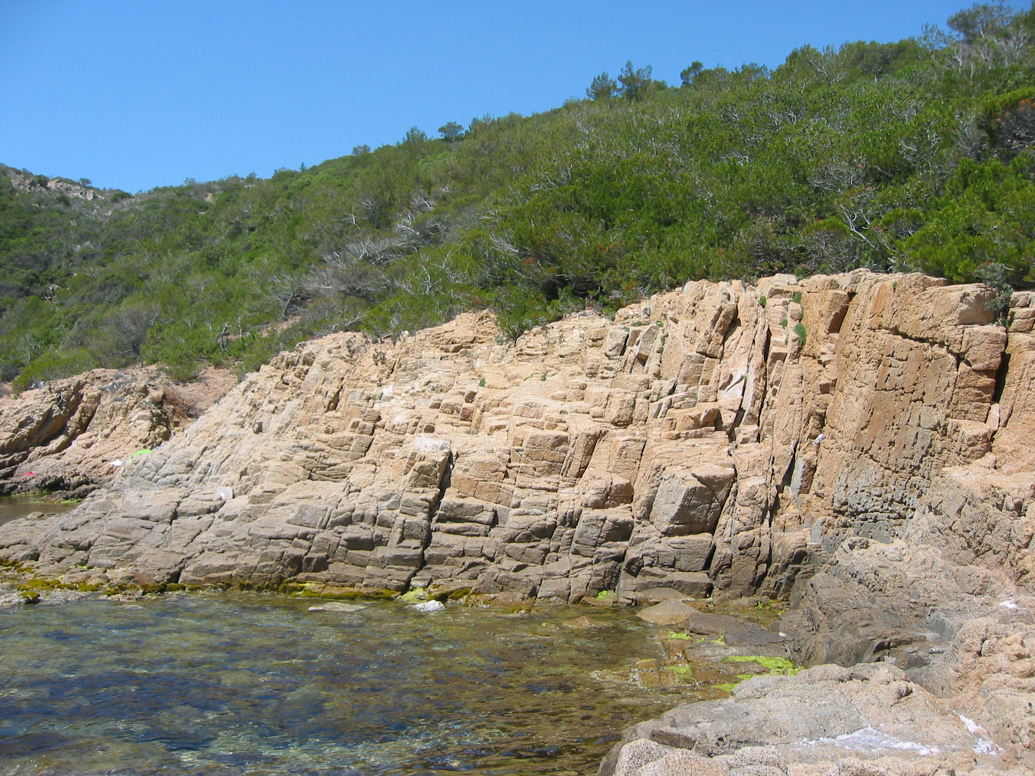 Massif des Maures, Var, France Le massif des Maures borde la mer Méditerranée. 16 june 2002 Author : civodule